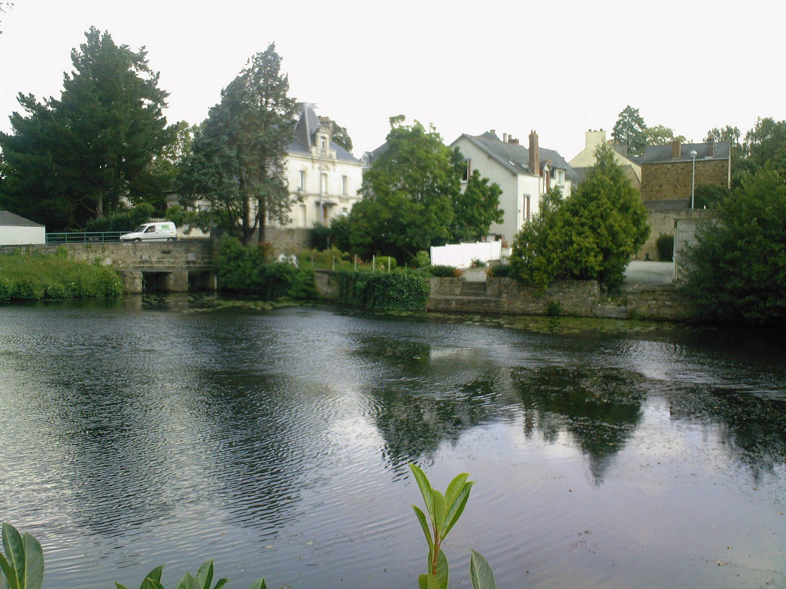 Châteaubriant - Étang de la Torche